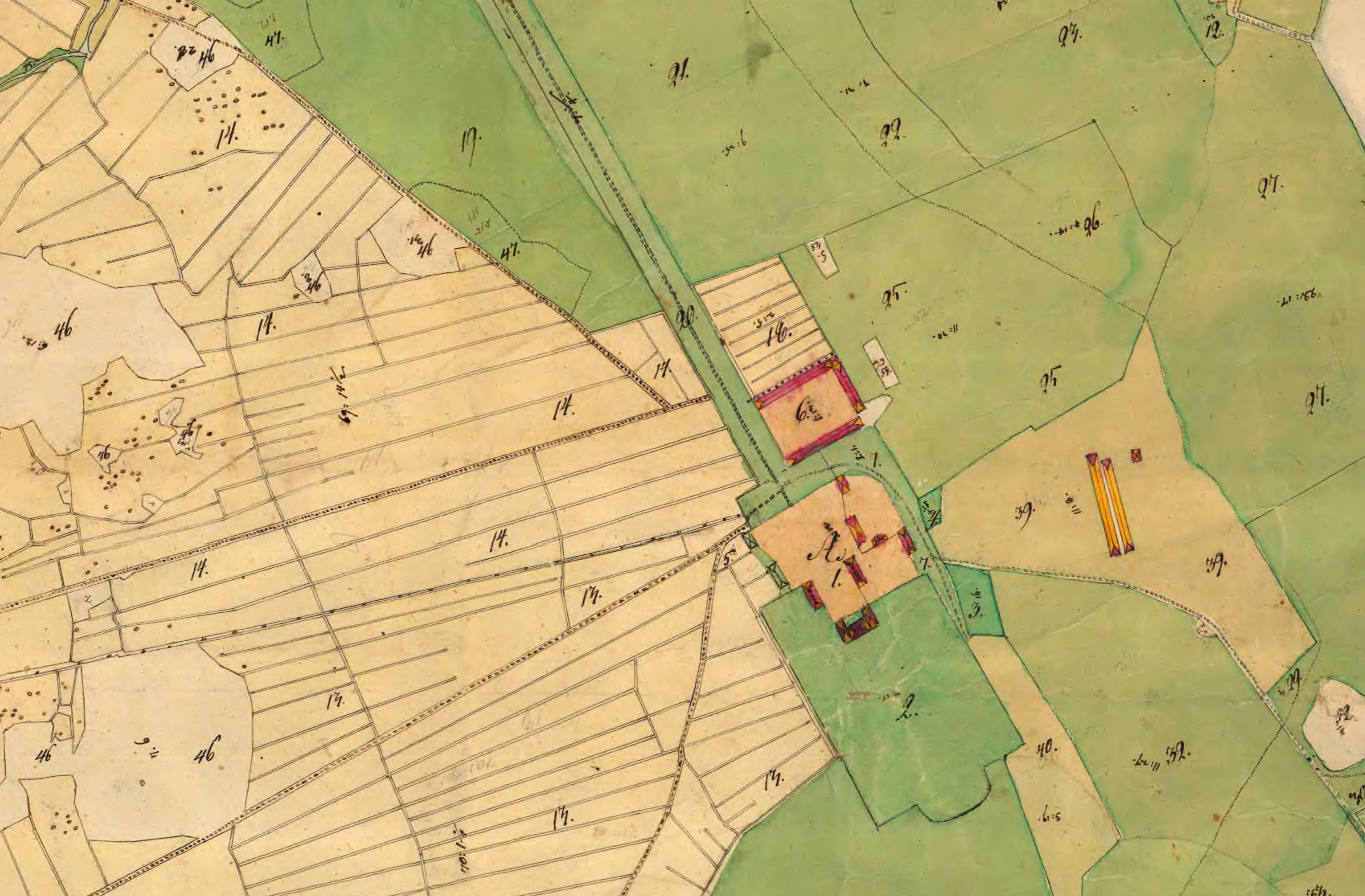 Haga slotts huvudbebyggelse